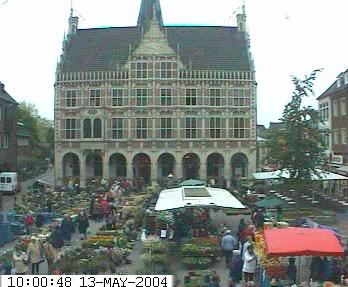 Historisches Rathaus von Bocholt